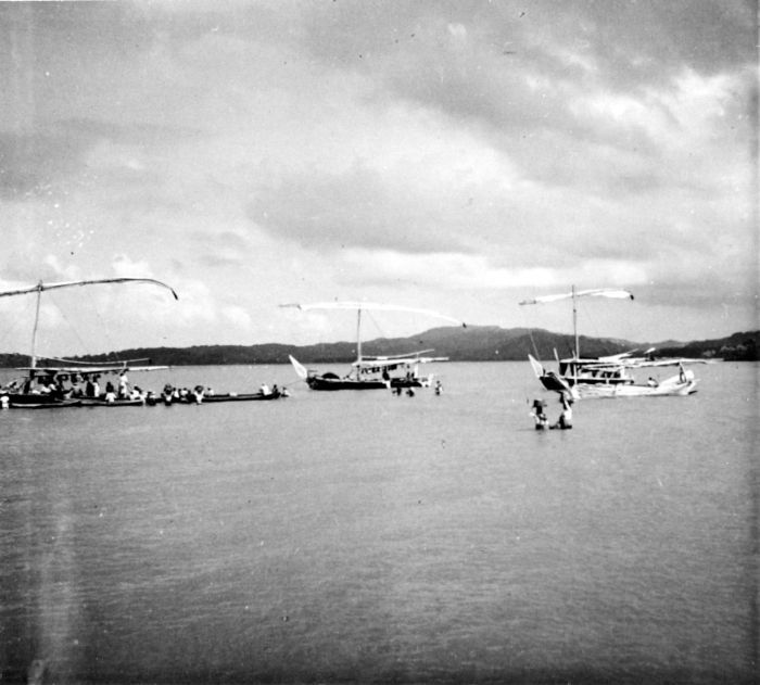 Repronegatief. Vissersprauwen voor Sangkapoera op het eiland Bawean, Oost-Java